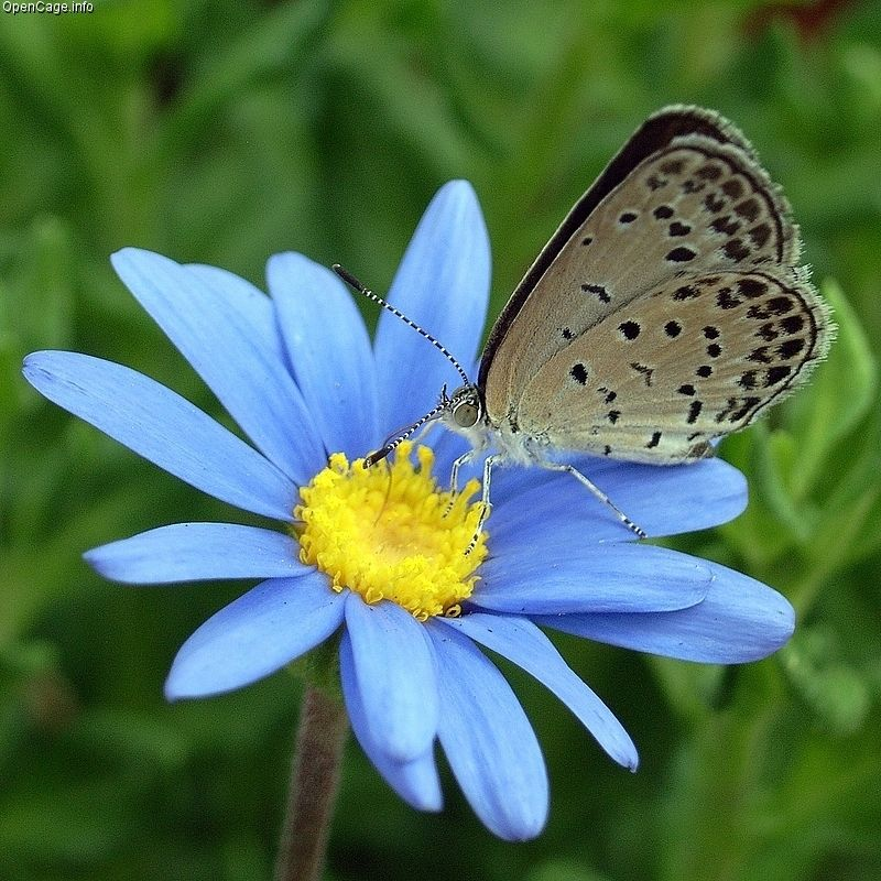 ヤマトシジミ Pseudozizeeria maha